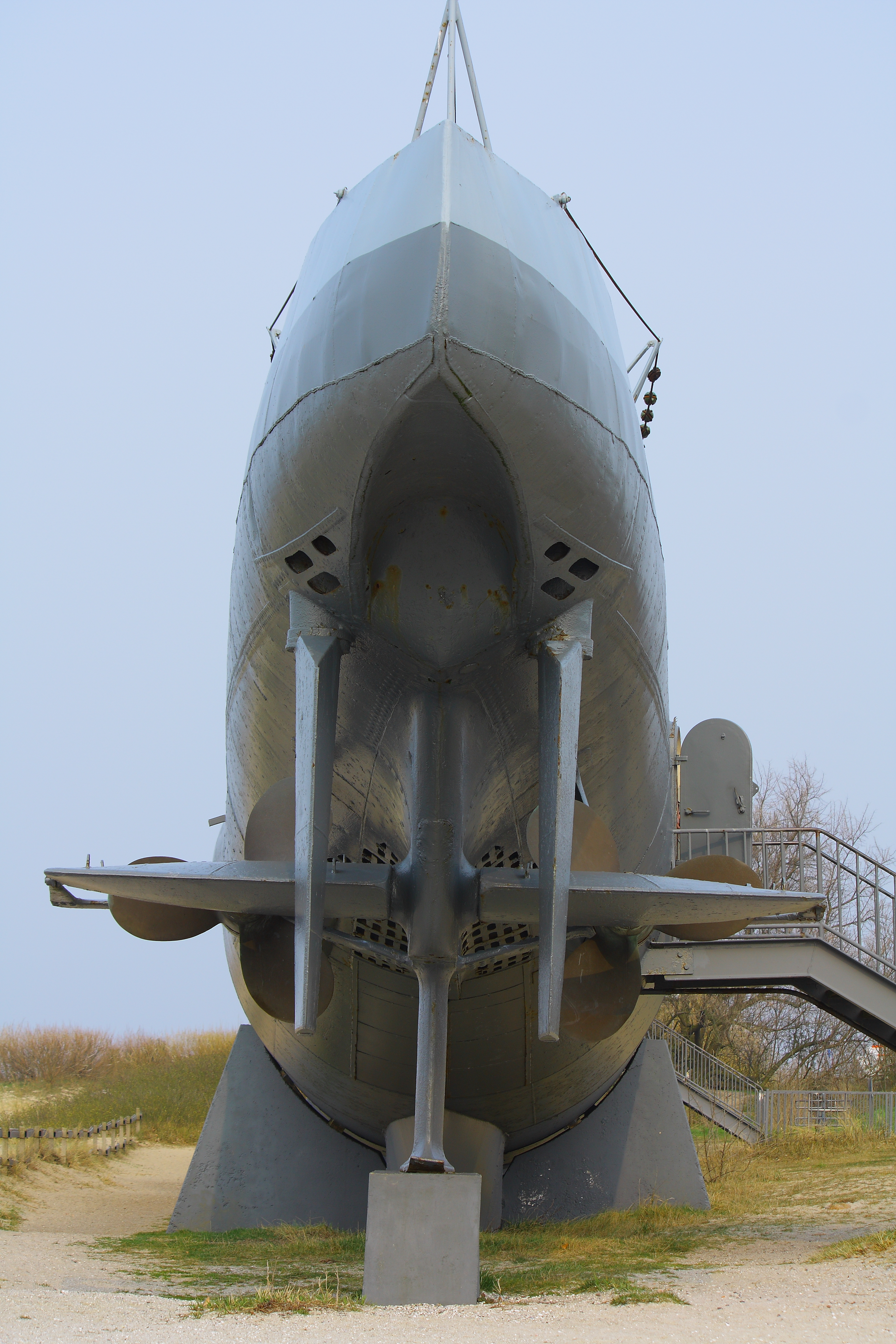 Heckaufnahme vom deutschen U-Boot U995 (VII C/41) in Laboe